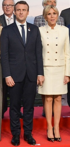 Photo de groupe avec les chefs d'État et leurs conjoints des pays membres du G7.